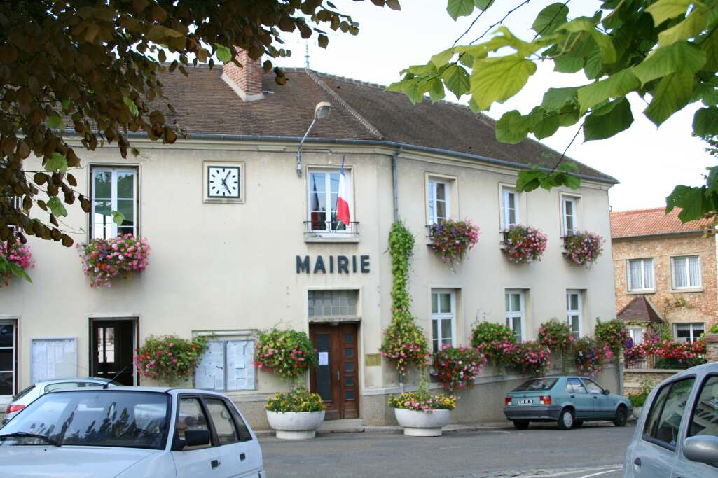 Mairie de Bouafle - Yvelines (France)